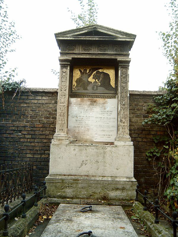 Gerster Béla sírja Budapesten. Kerepesi temető: B. 299. [szobrász: Stróbl Alajos, festő: Lotz Károly].